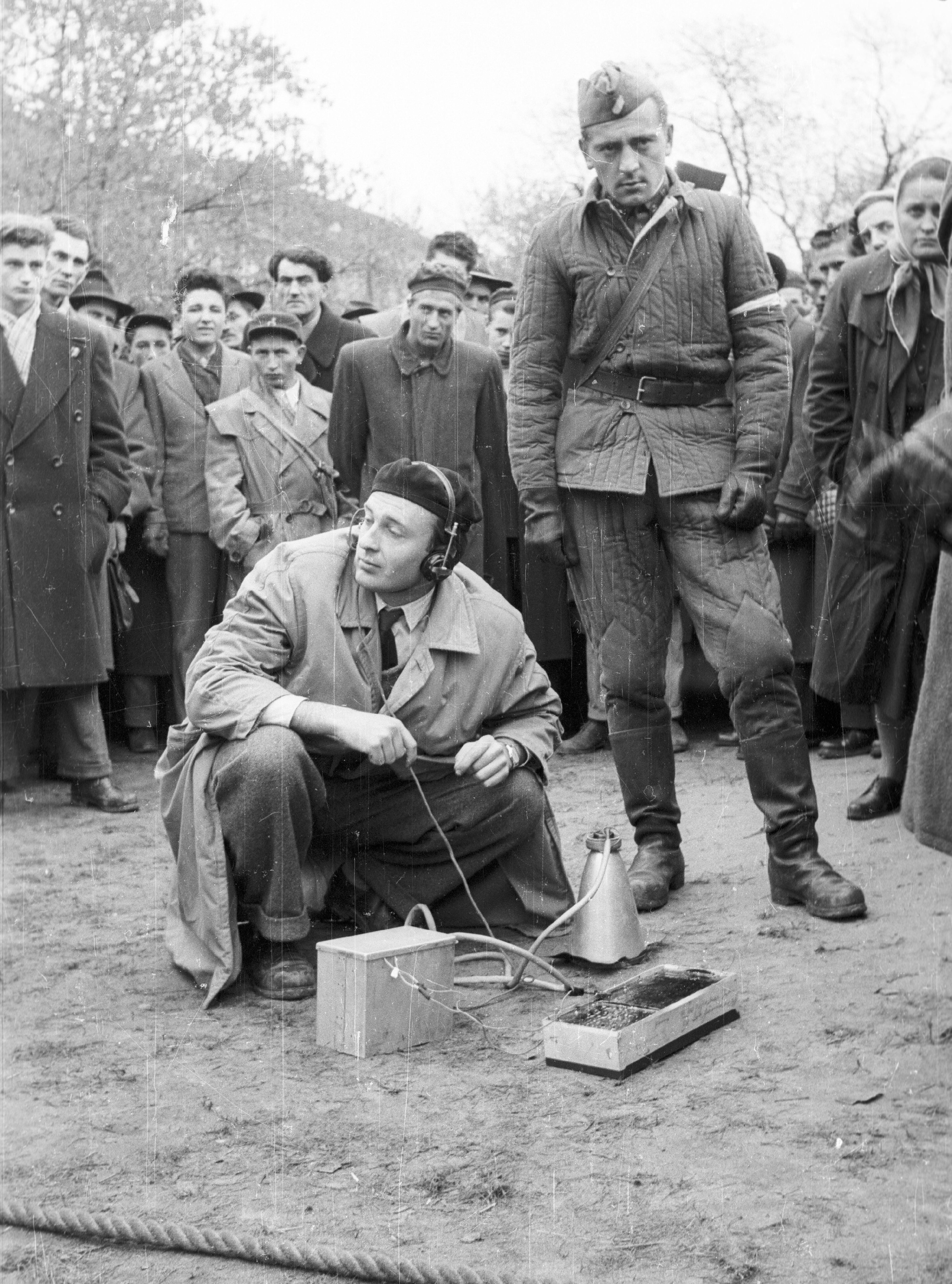 II. János Pál (Köztársaság) tér, a pártházhoz kötődő feltételezett kazamaták keresése. Location: Hungary, Budapest VIII. Tags: revolution, instrument, curiosity, Budapest Title: II. János Pál (Köztársaság) tér, a pártházhoz kötődő feltételezett kazamaták keresése.